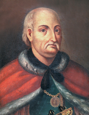 Іван Скоропадський